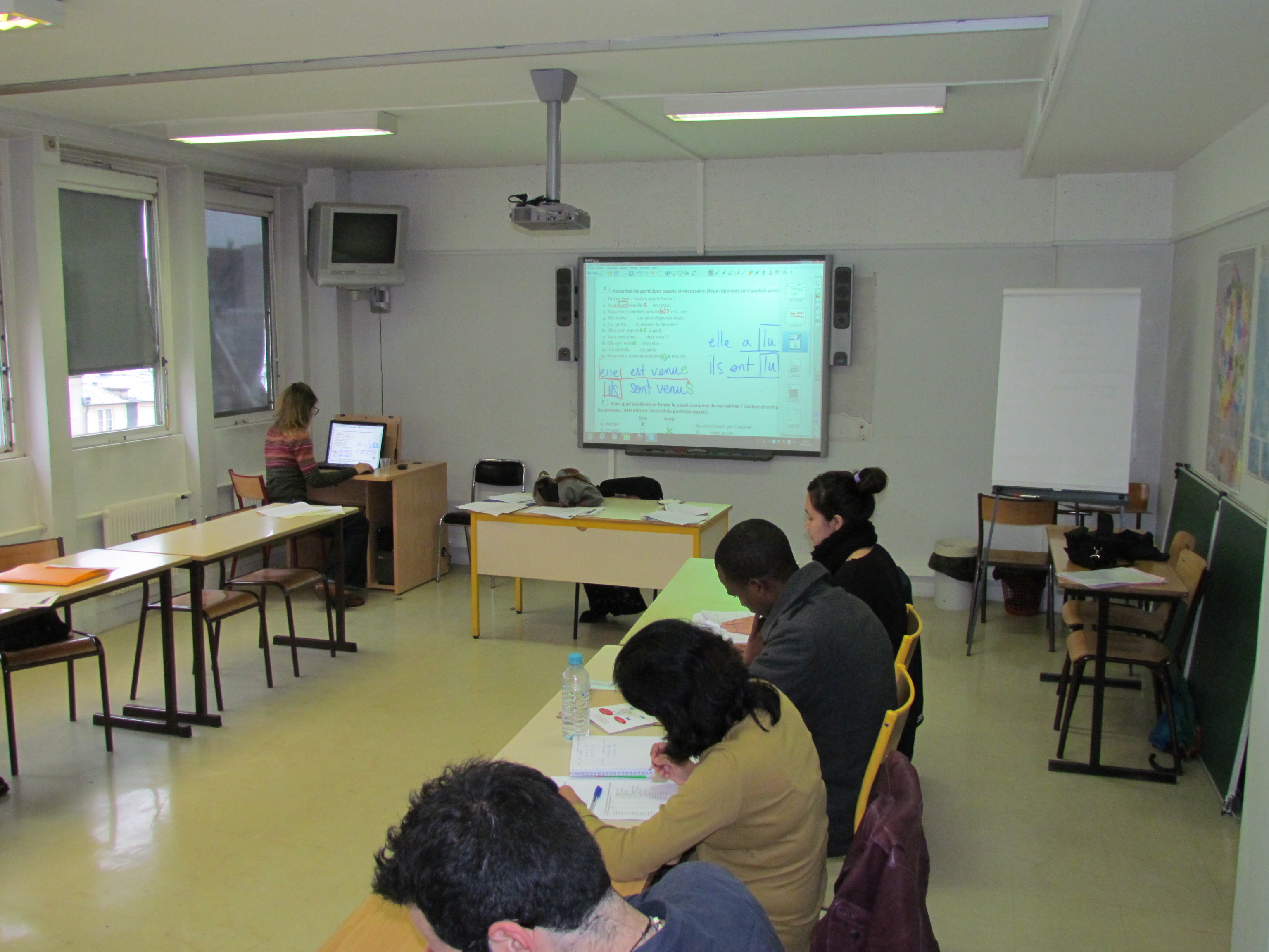 salle équipée d'un TNI (Tableau Numérique Interractif) à l'Alliance française Paris Ile-de-France